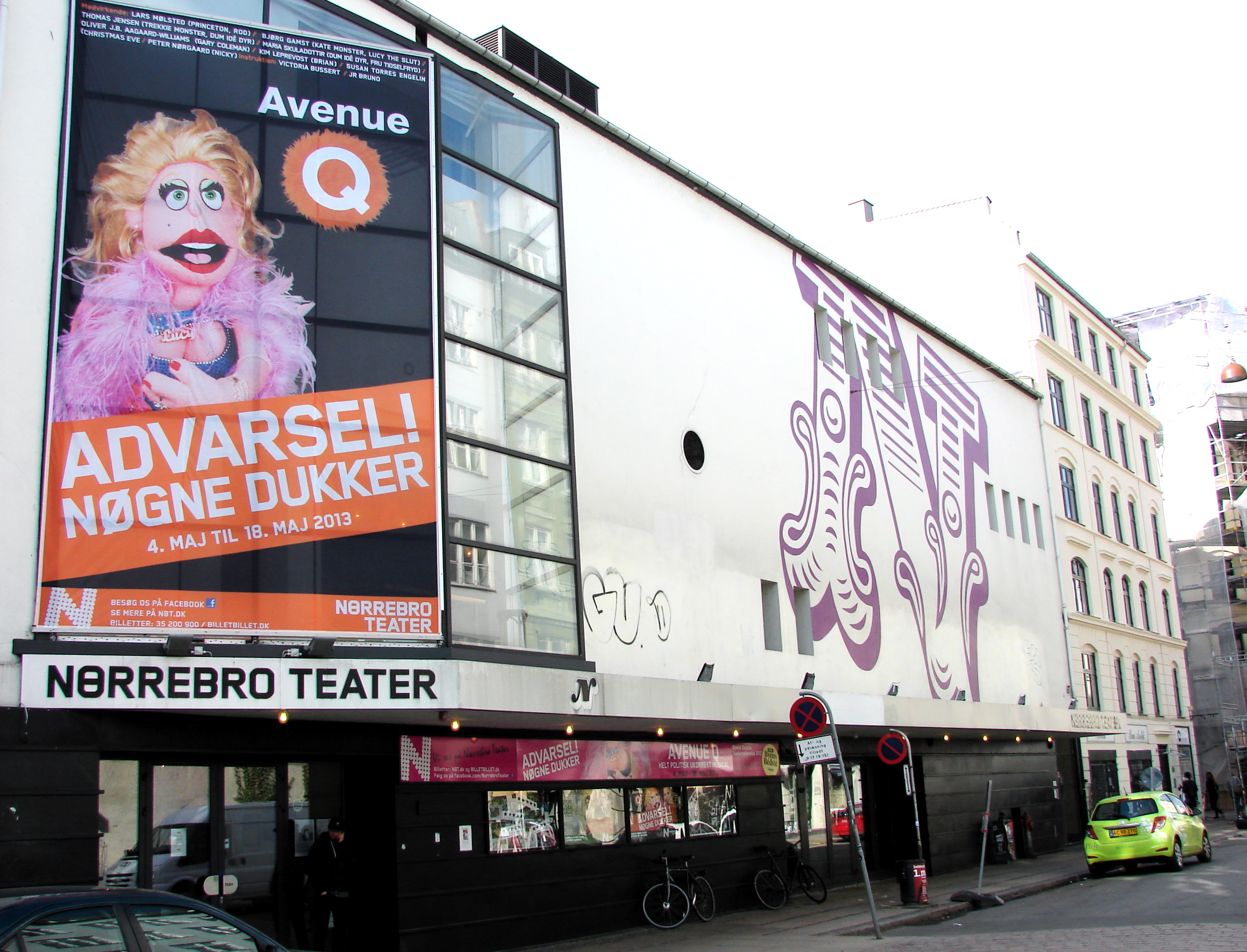 Nørrebro Teater, Ravnsborggade, København